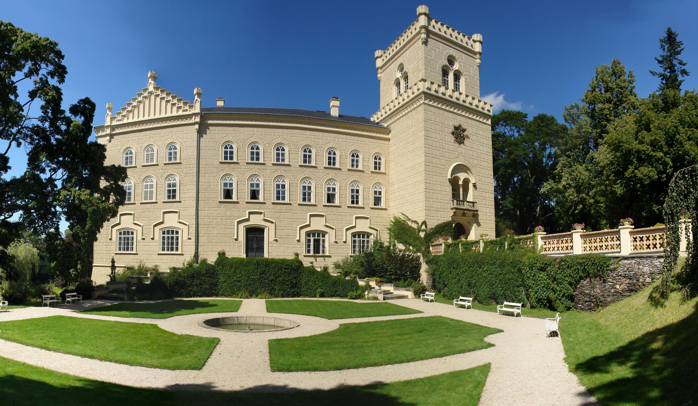 Zámek Chyše, v obci 30, Chyše